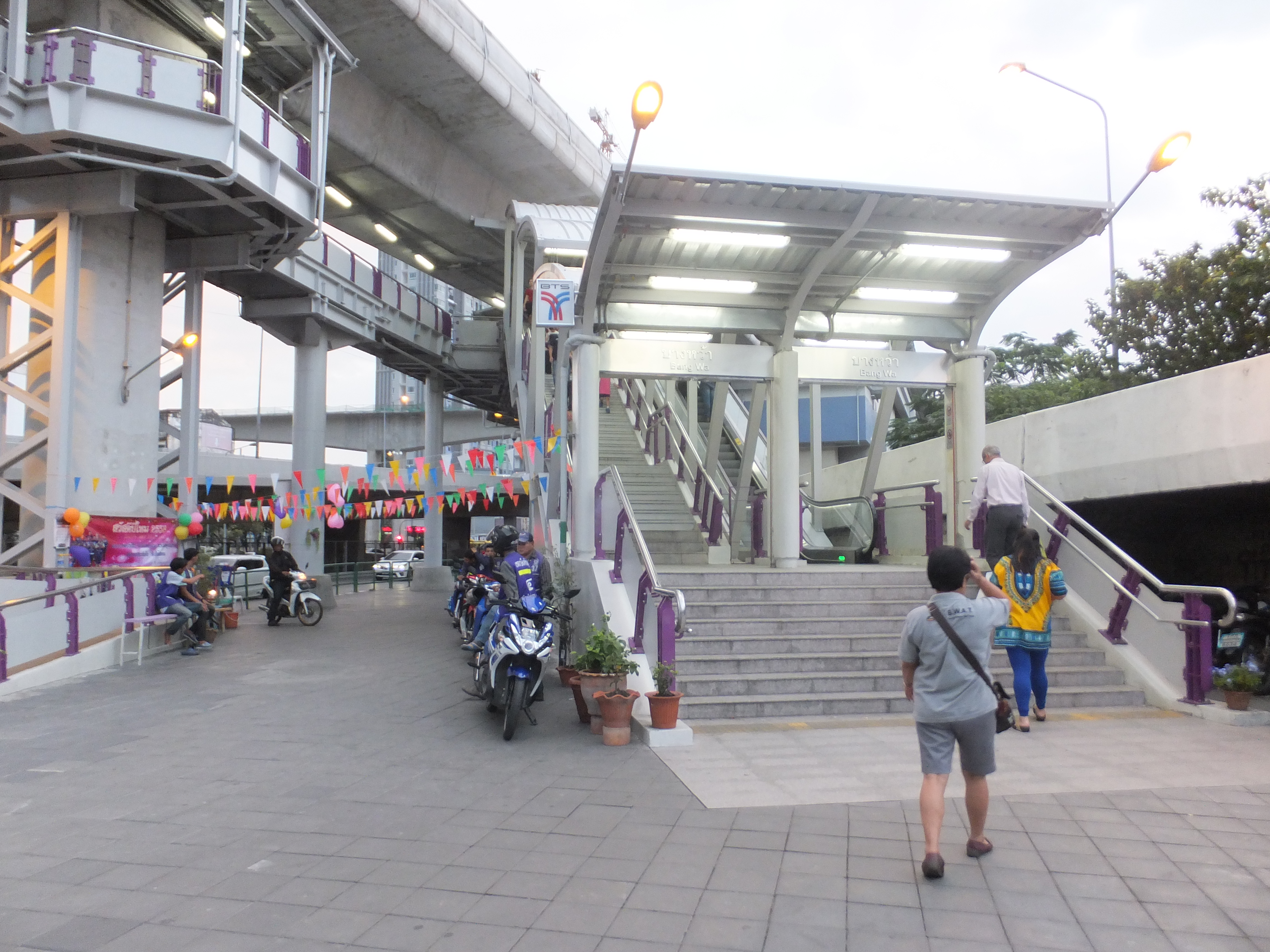 タイ王国、バンコクスカイトレインのバーンワー駅入口。